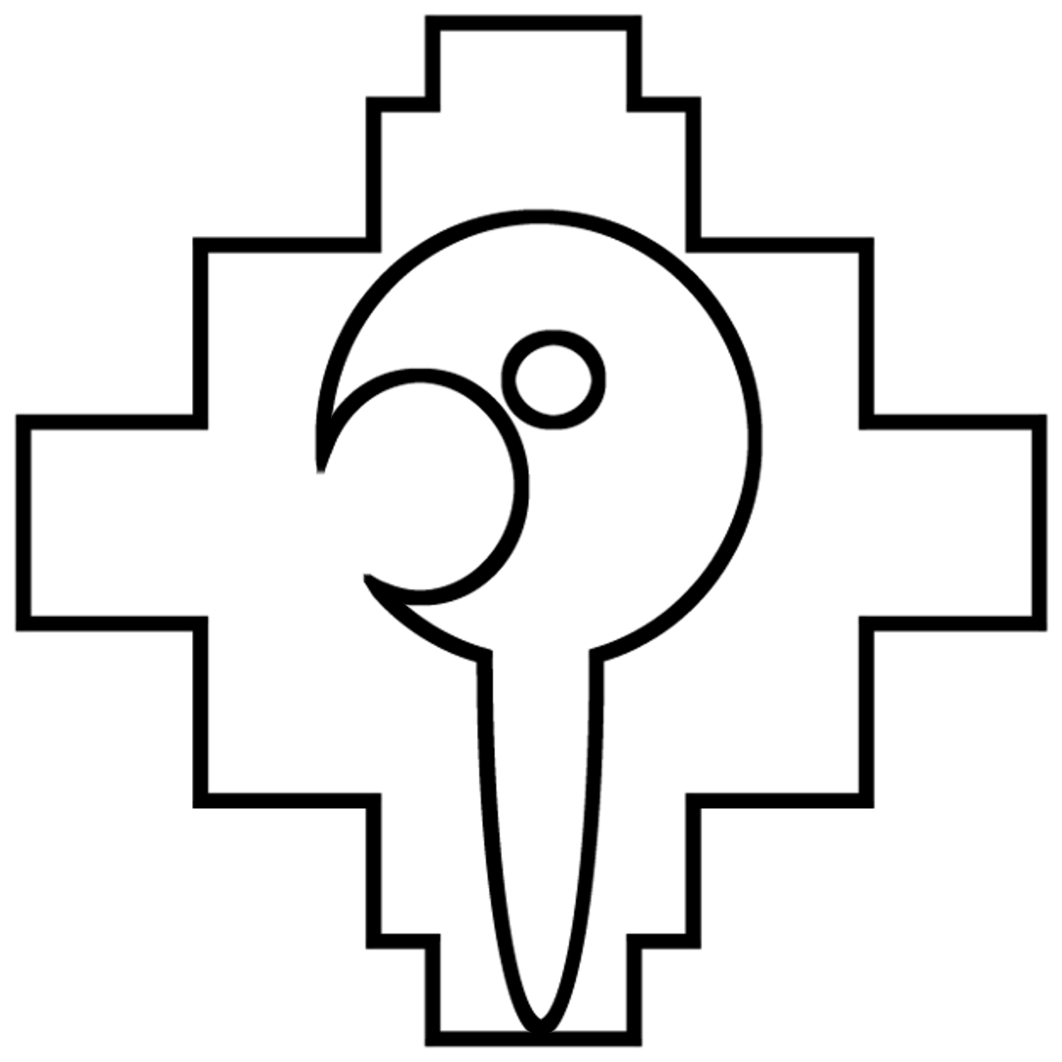 Logo usado por la Coordinadora Arauco-Malleco (CAM)